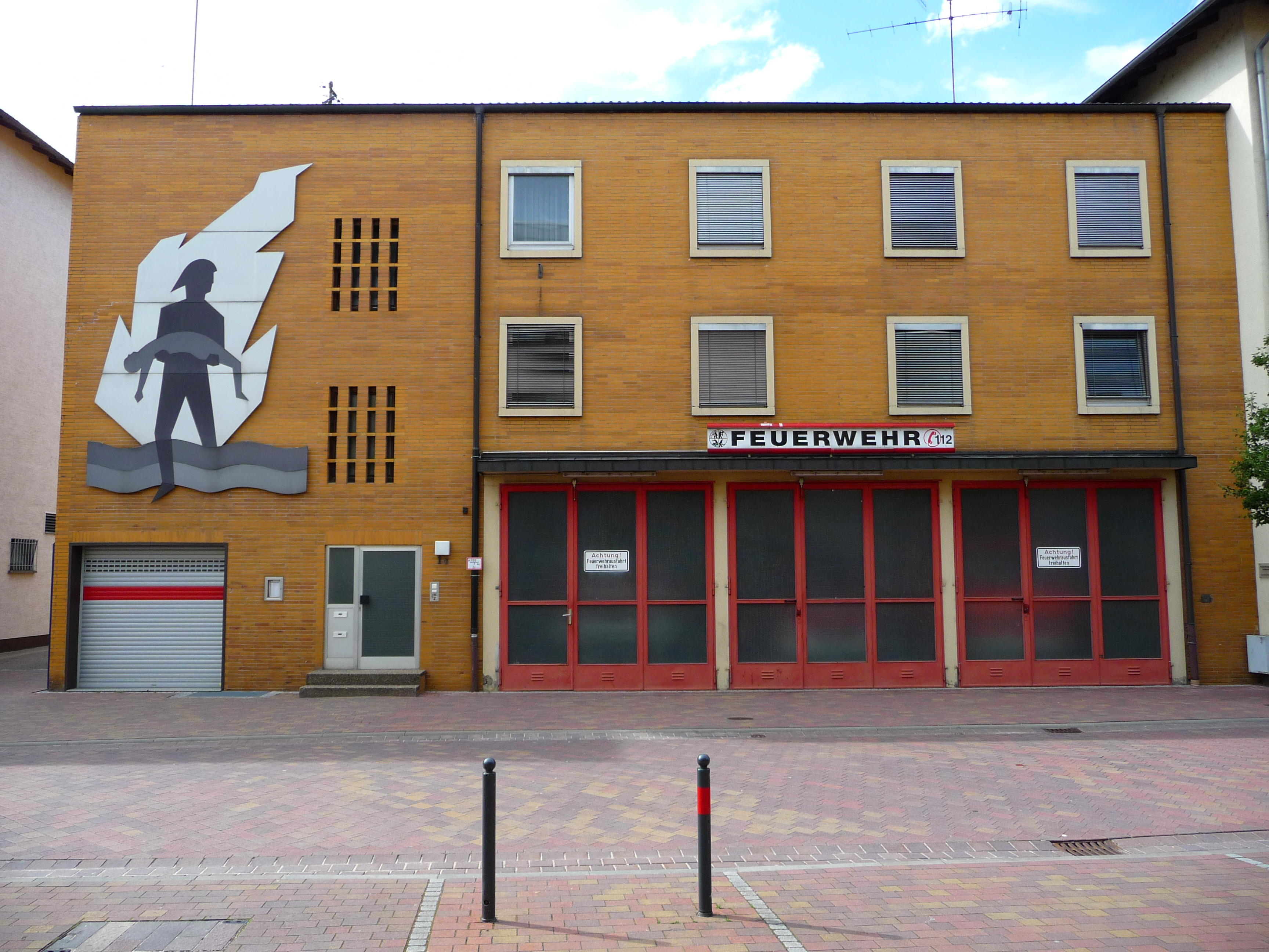 Gebäude der freiwilligen Feuerwehr in Oftersheim (Rhein-Neckar-Kreis, Deutschland)